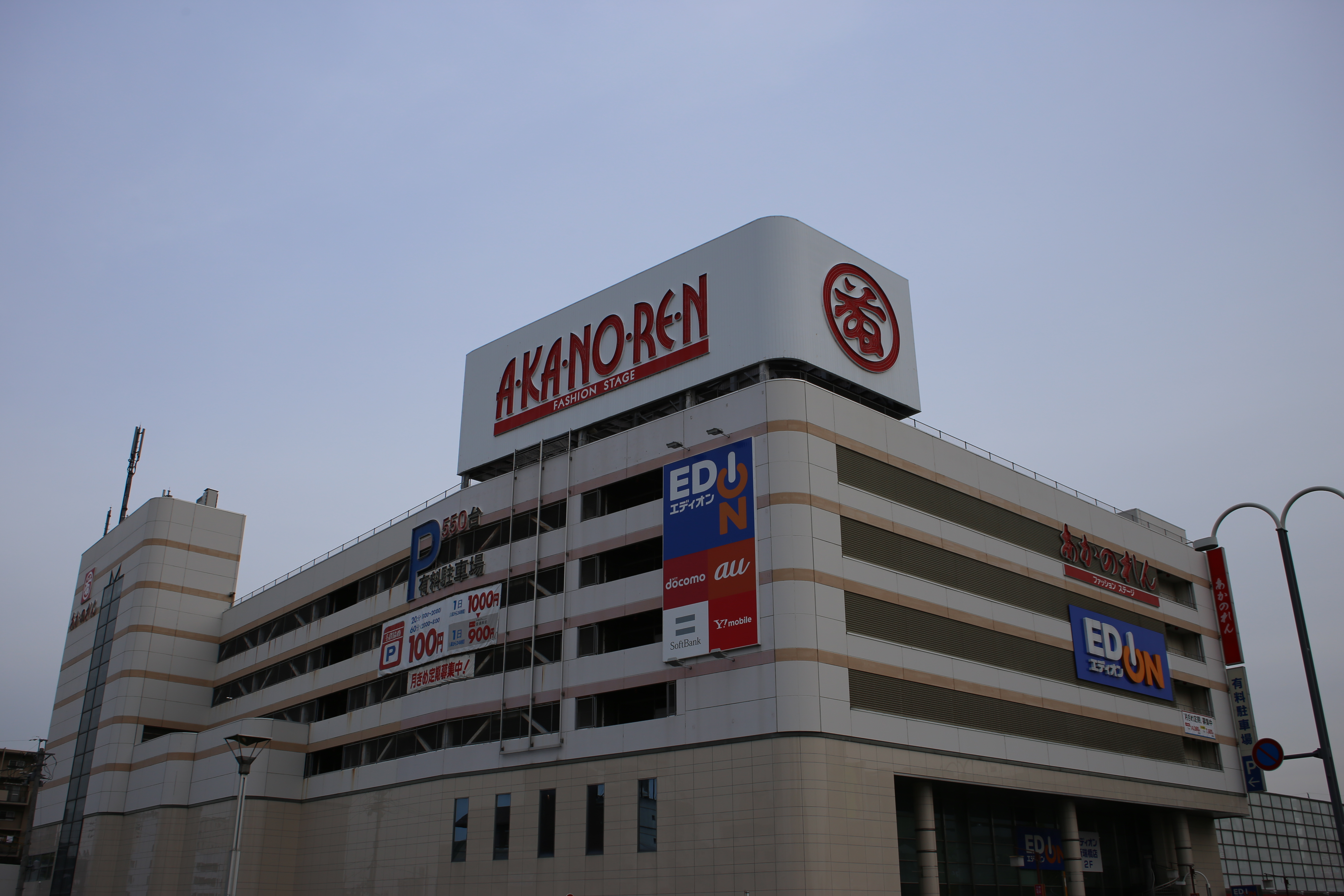 名古屋市南区駈上一丁目のあかのれん新瑞橋店